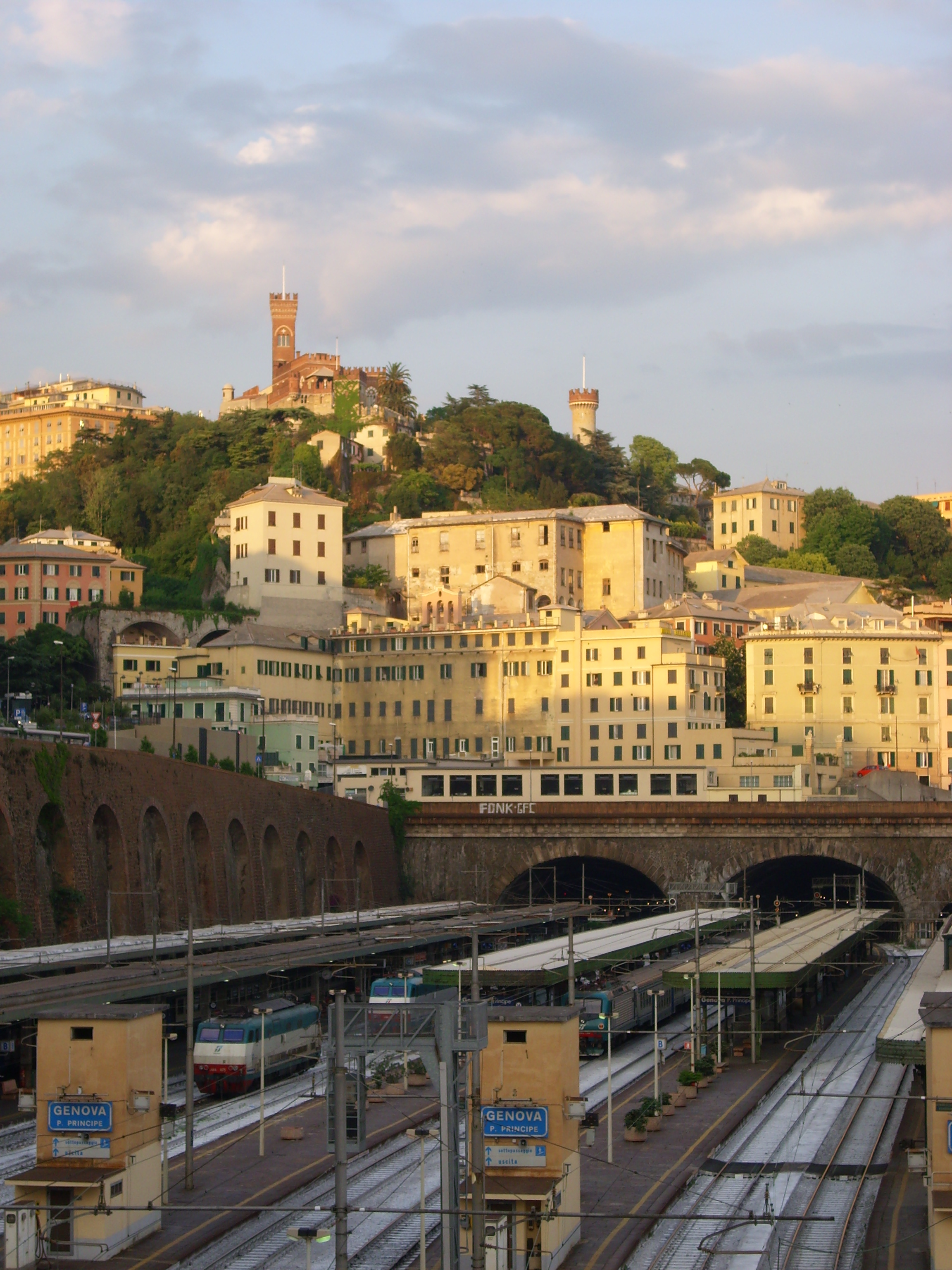 Stazione ferroviaria di Genova Piazza Principe. Sullo sfondo in alto si nota il castello d'Albertis.